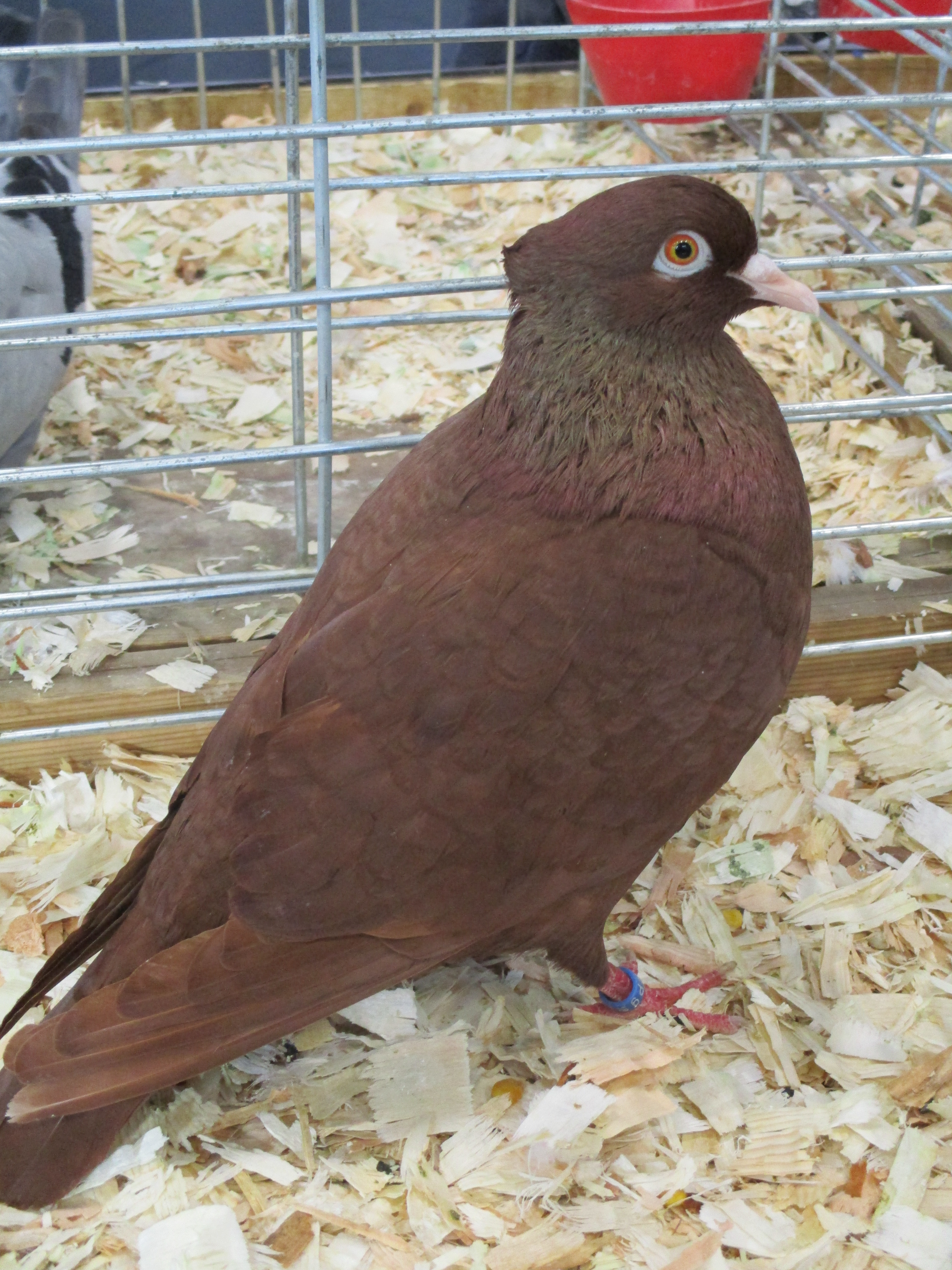 Pigeon huppé picard. SIA 2019.